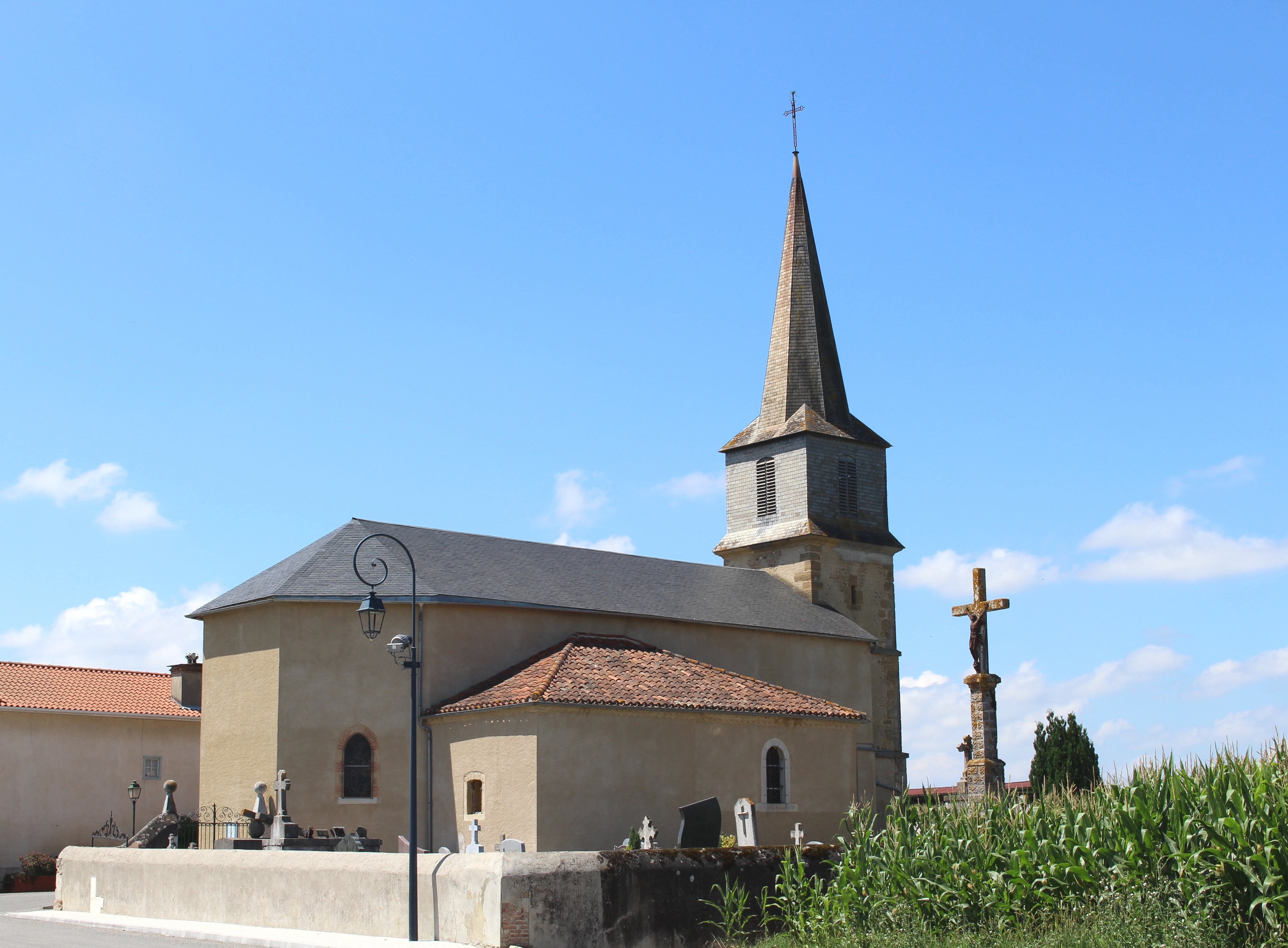 Église de l'Assomption de Campuzan (Hautes-Pyrénées)